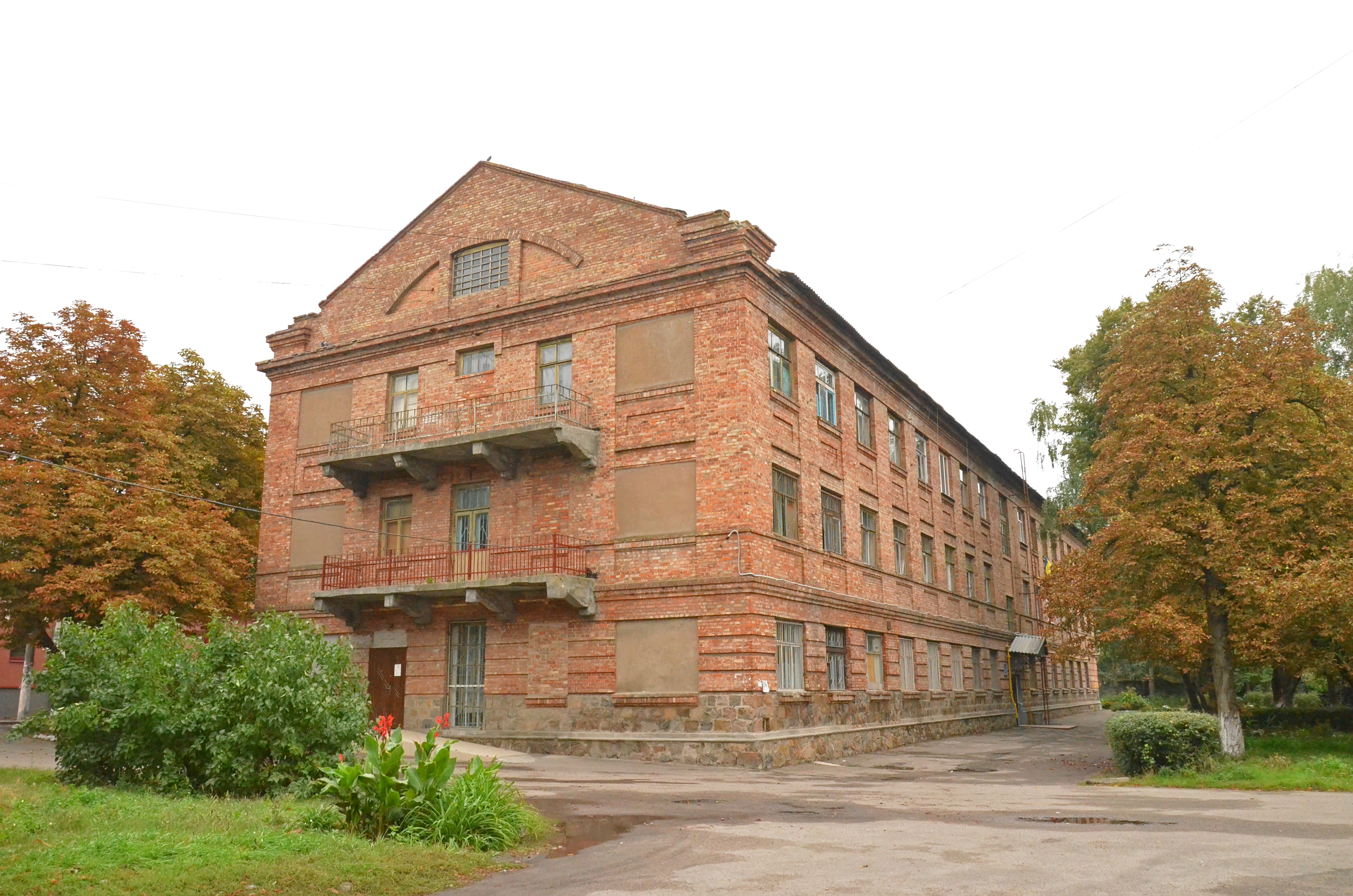 Гуртожиток №2 БНАУ. Біла Церква, Клубний провулок, 2/35. Вигляд із північного заходу.